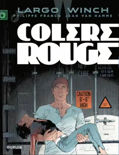 Couverture d'un des albums de Largo Winch (bande dessinée)